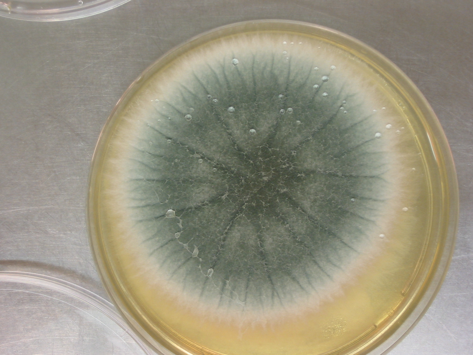 kolonie van Aspergillus fumigatus (macroscopie, schimmel) eigen werk